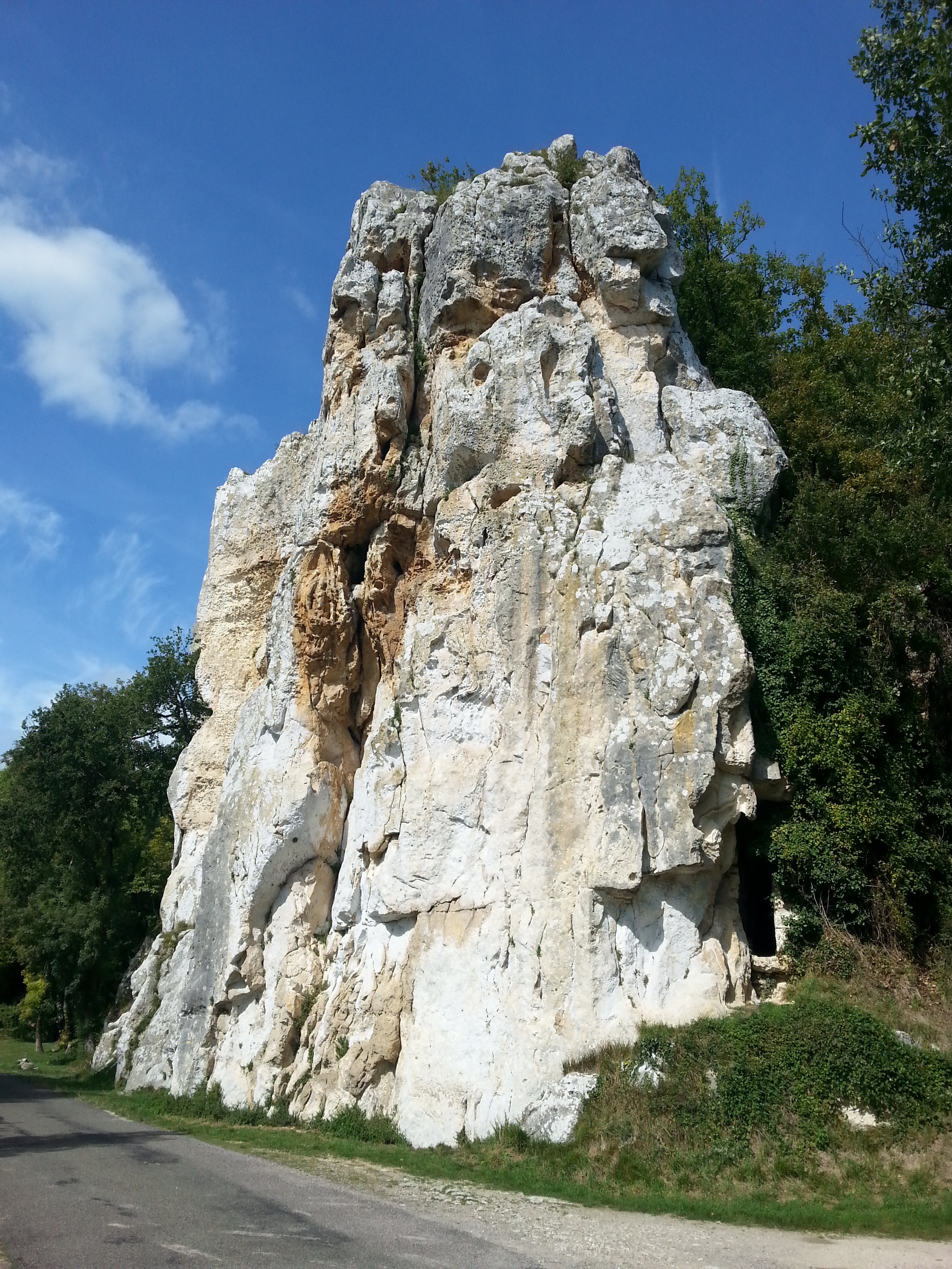 Mérigny (36) : Le rocher de la Dube.